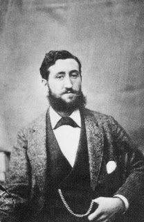 Serafino de Tivoli, retrato anónimo (1875).